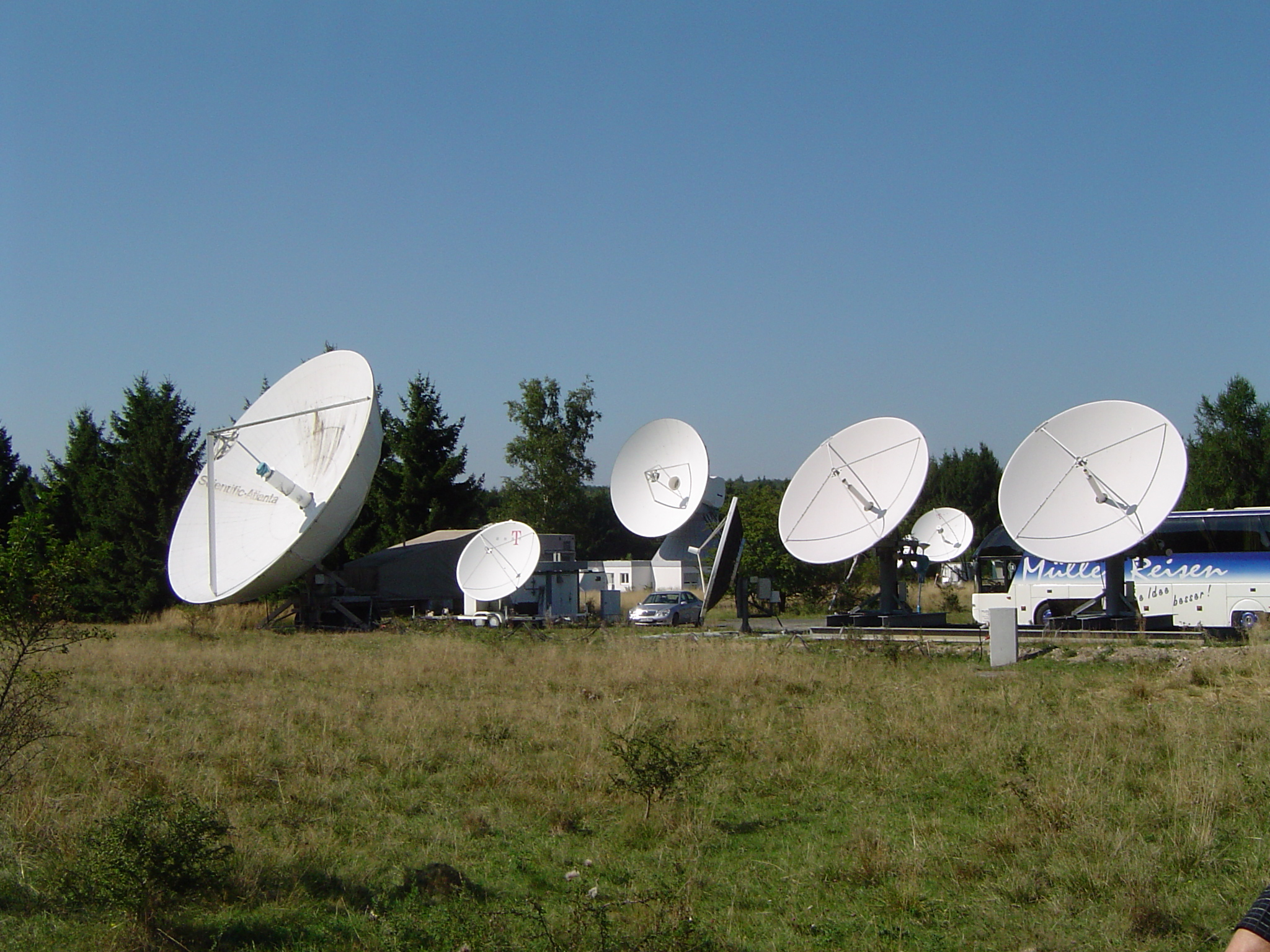 Sendeanlagen der Erdfunkstelle Usingen